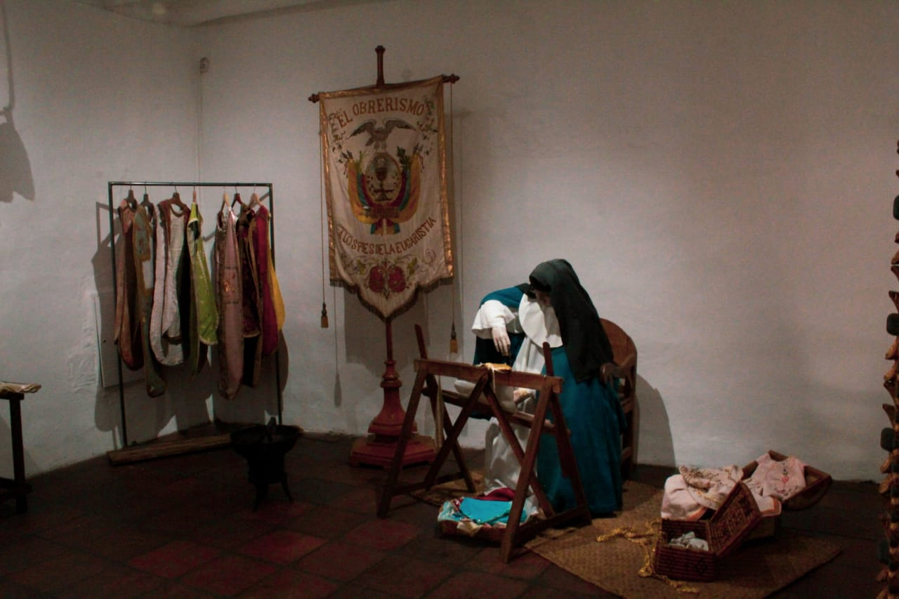 Sala museo de las Conceptas Cuenca